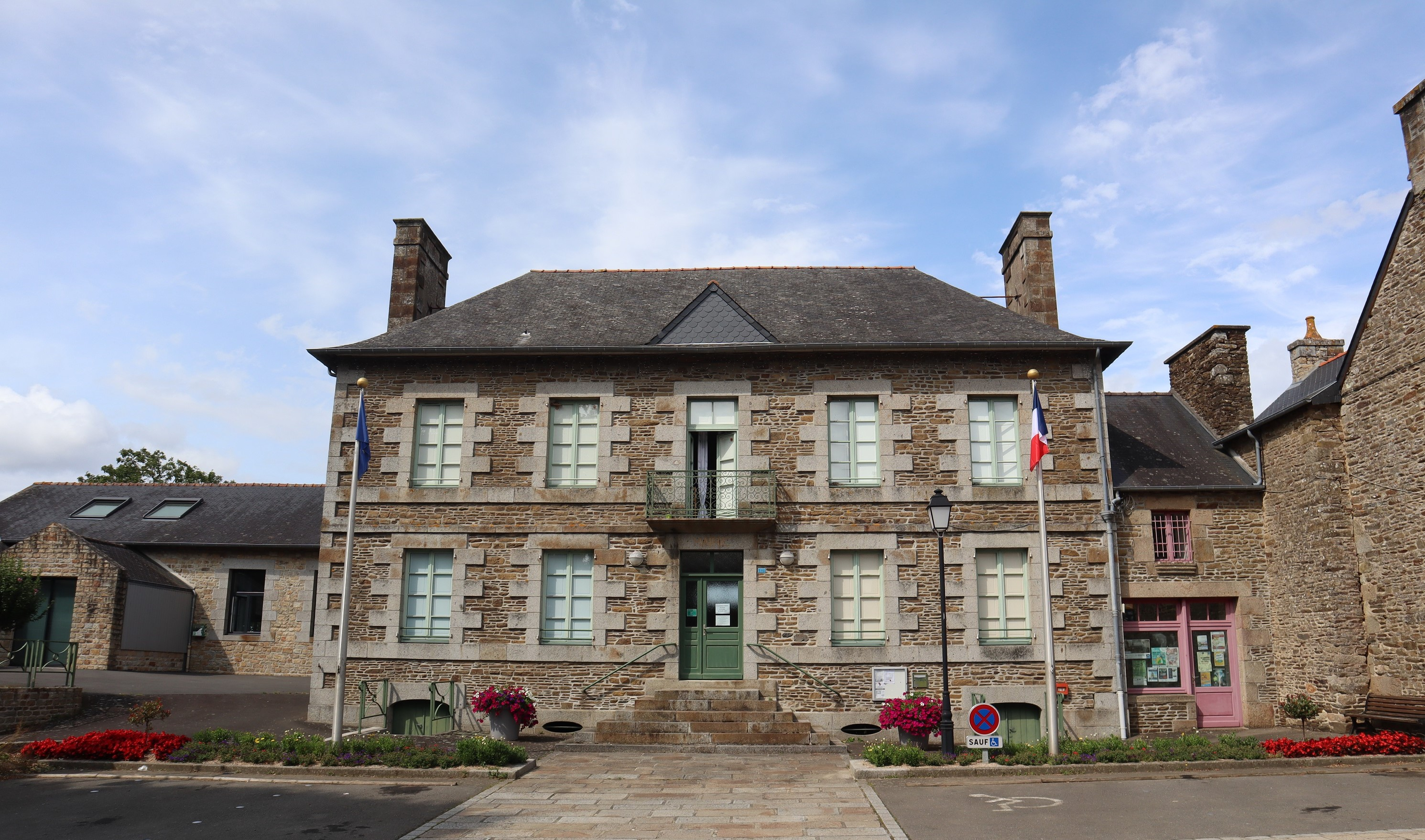 Mairie de Saint-Ouen-La-Rouërie (35)